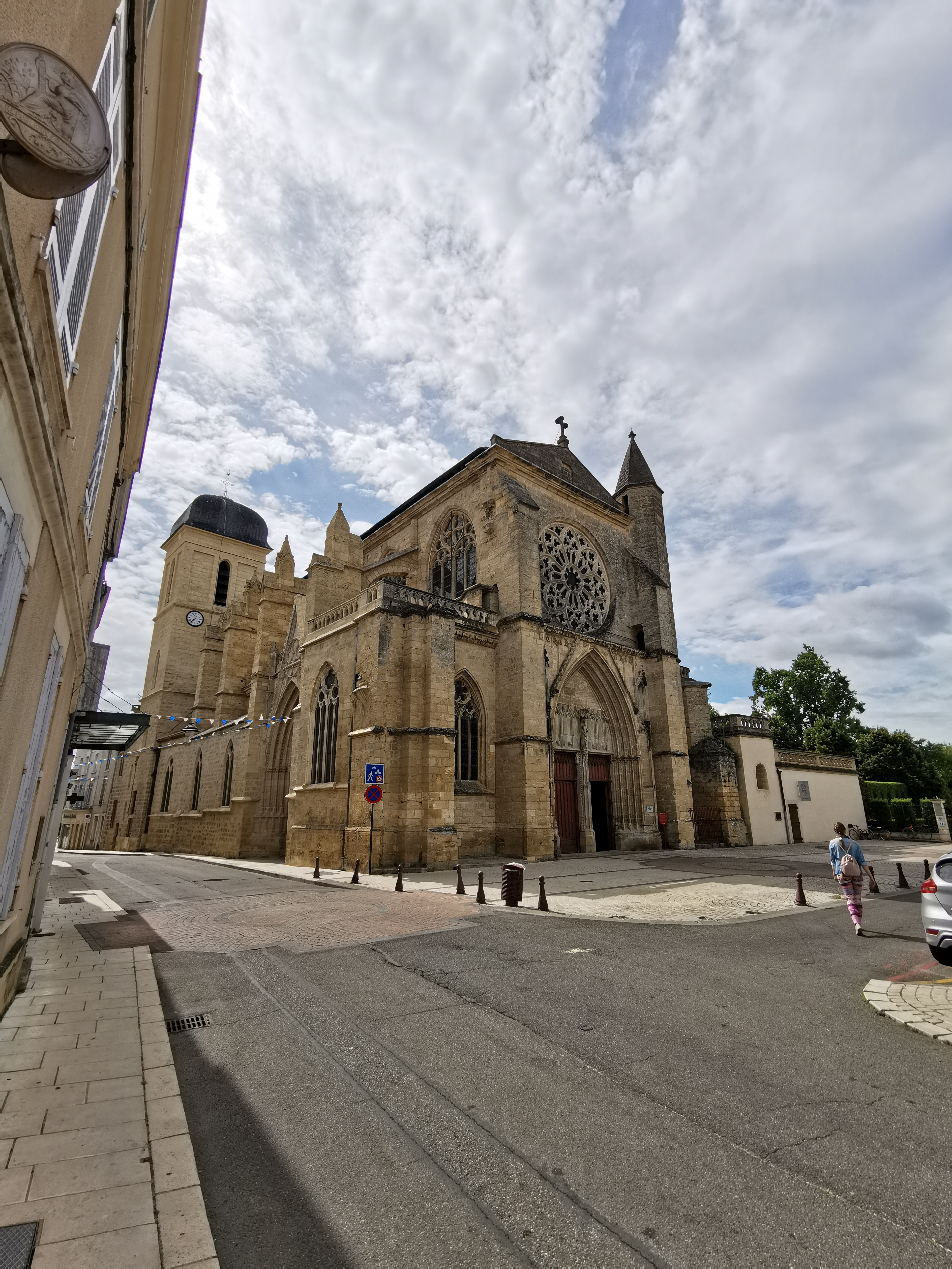 Katedra w Marmande, Francja